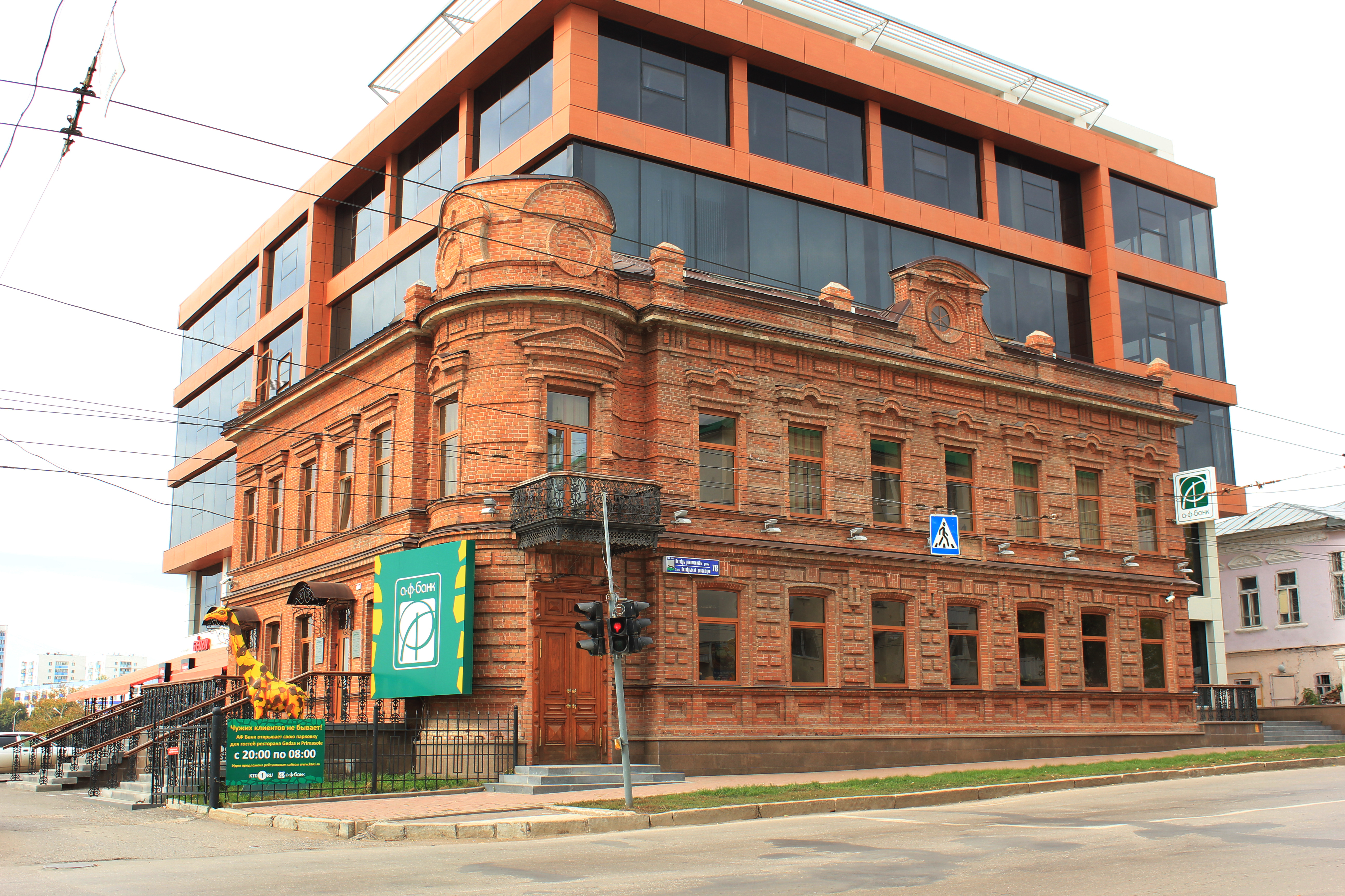 г. Уфа ул. Октябрьской революции 78 В настоящее время "Здание АФБанк"